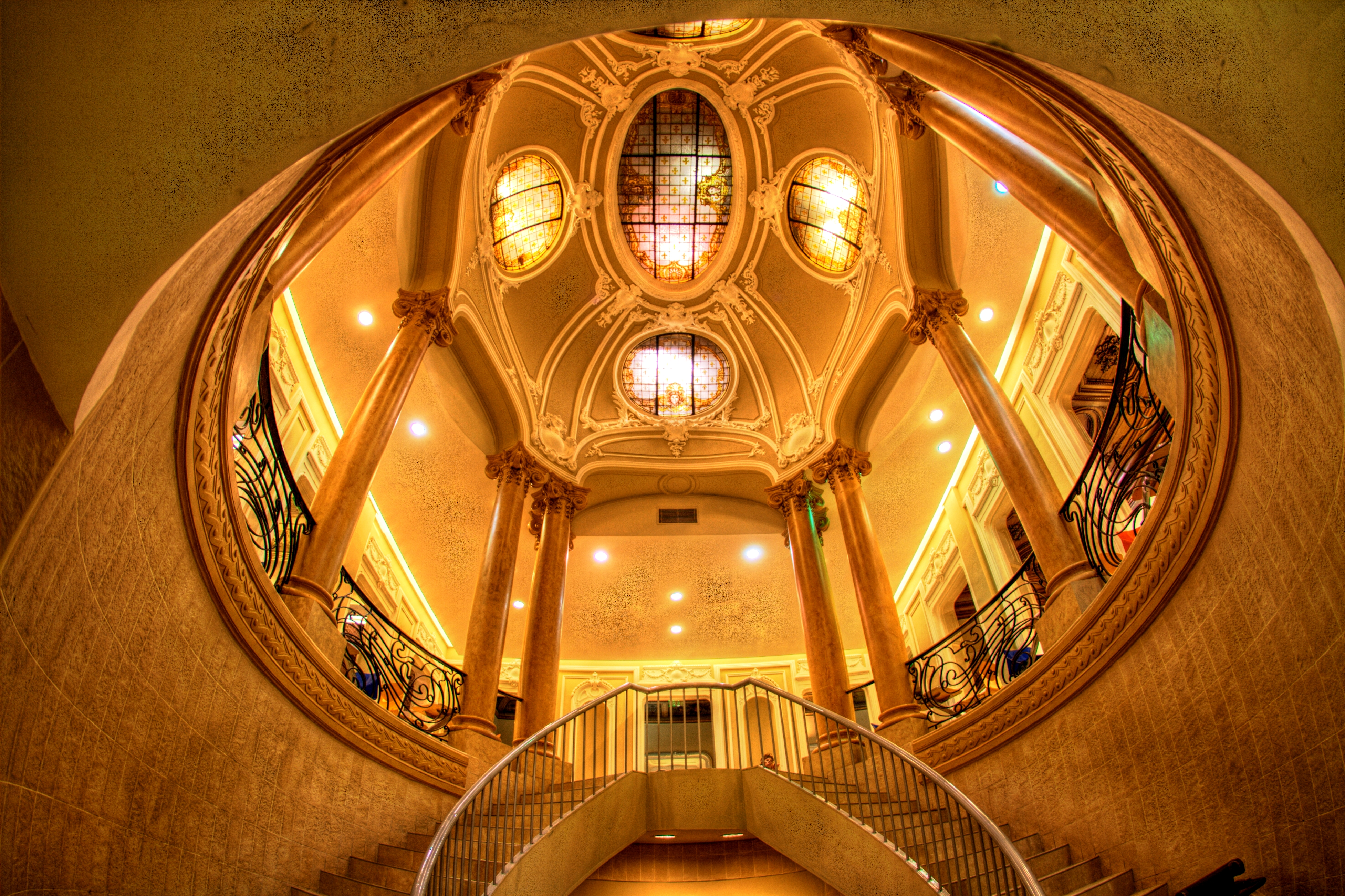 Palacio Alvear-Elortondo, Corrientes y Florida, Buenos Aires, Argentina.